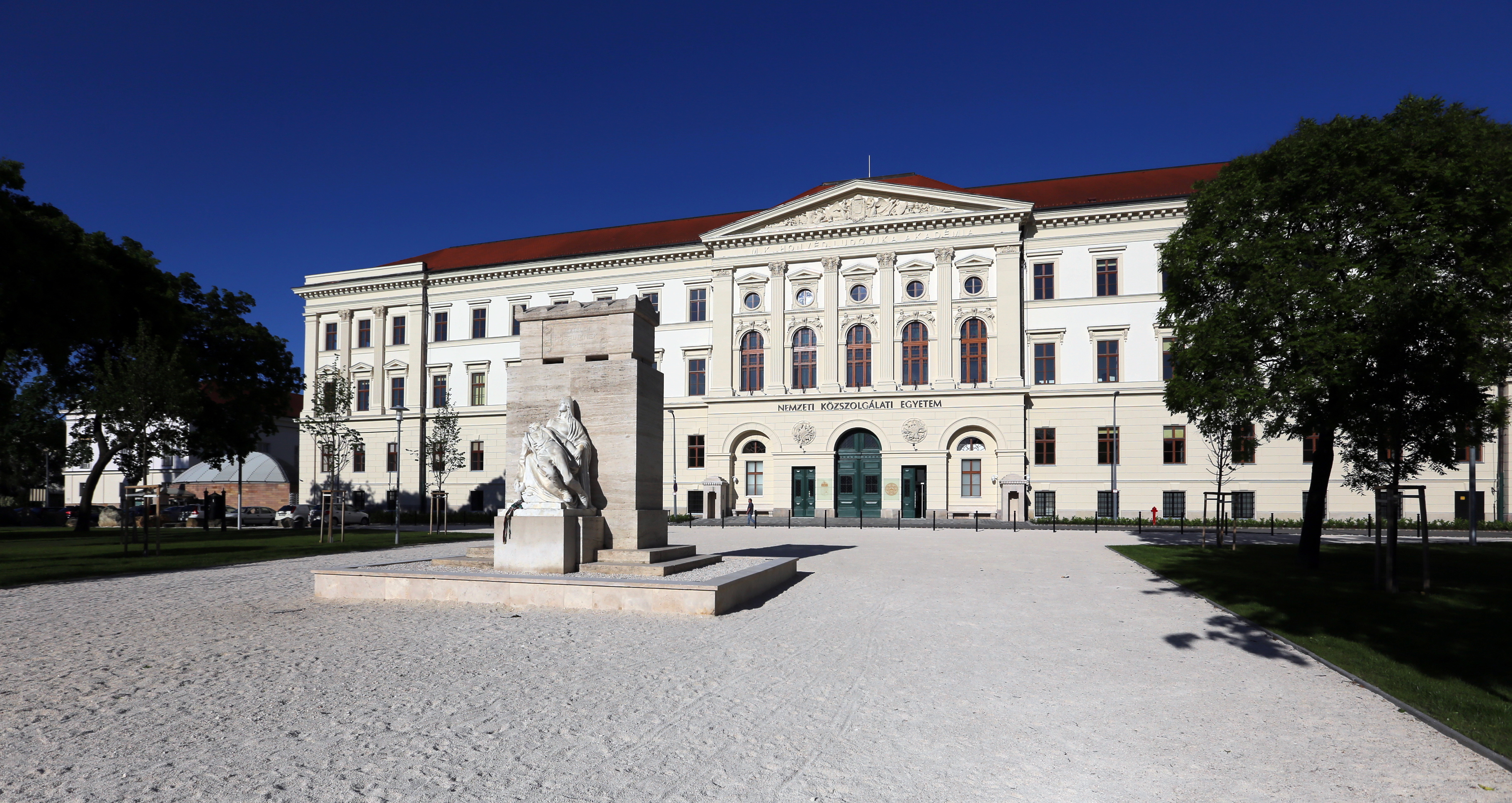 Ludovika